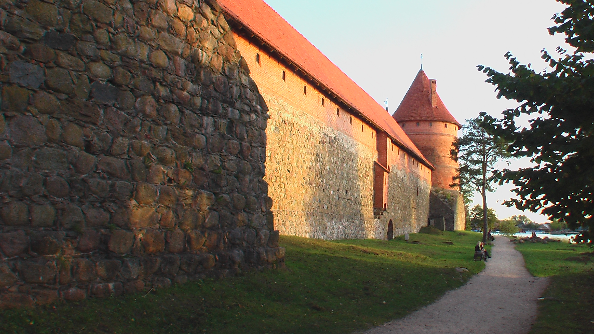 Ansicht der Burg von Westen